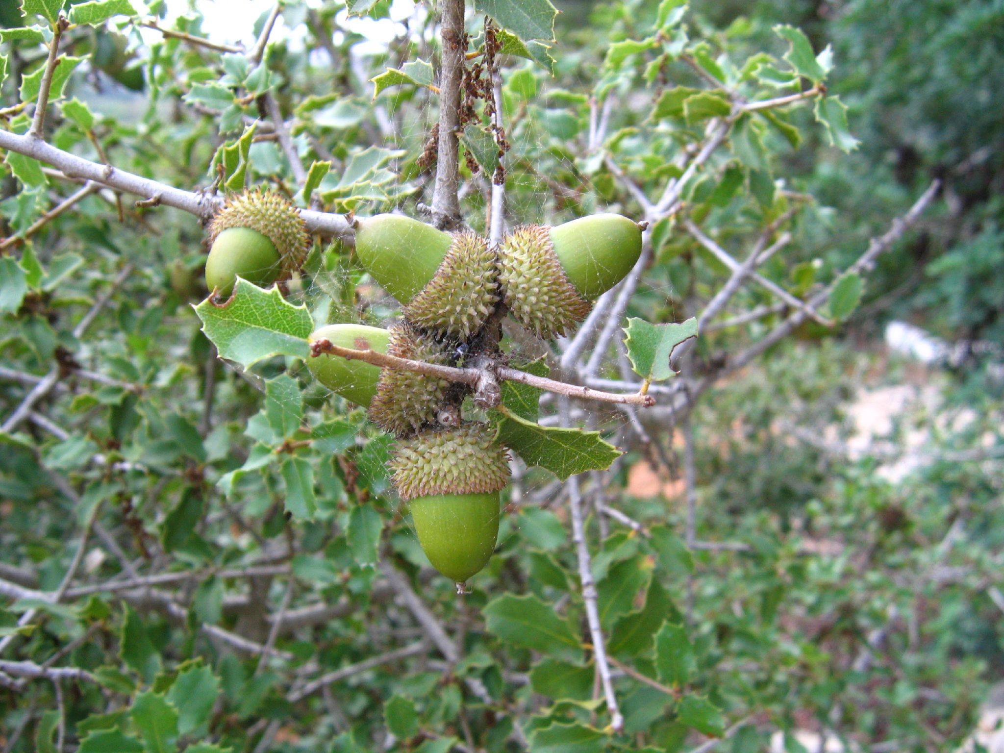 Quercus coccifera foliage and acorns. Dénia, Valencia, Spain.